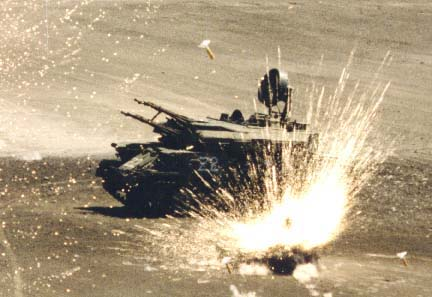 Un ZSU-23-4 utilisé comme cible des sous-munitions BLU-97 d'un AGM-154 Joint Standoff Weapon.